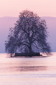 Cormorans devant l'Ile de Peilz